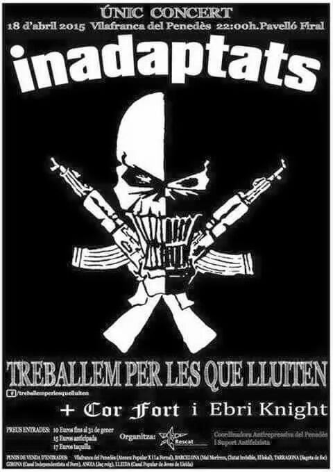 Cartell del concert únic de retorn del grup musical Inadaptats, celebrat a Vilafranca del Penedès el 18 d'abril de 2015.